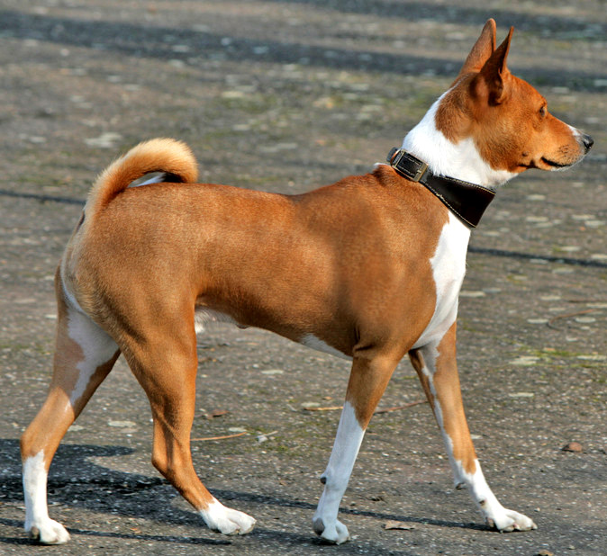 camminare da... basenji